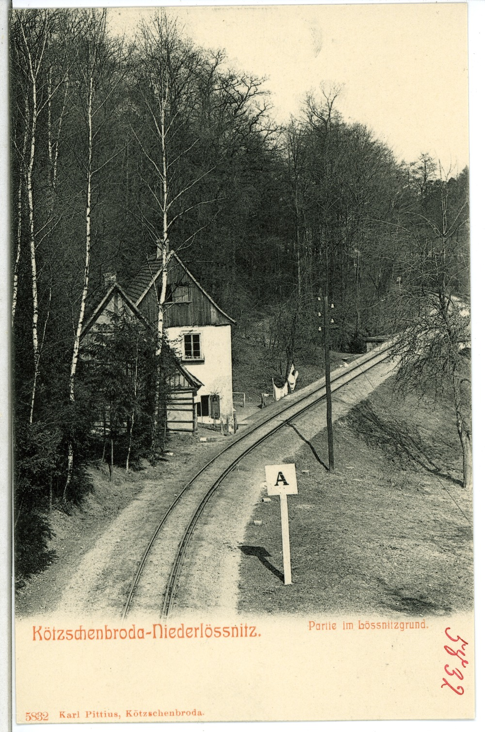 Kötzschenbroda; Blick auf den Bahndamm im Lößnitzgrund This postcard is from publisher Brück & Sohn in Meißen ( postcard has a unique number 05832 and is available in a higher resolution at the publisher. This images was uploaded in a cooperation project between Wikipedians and the publisher.